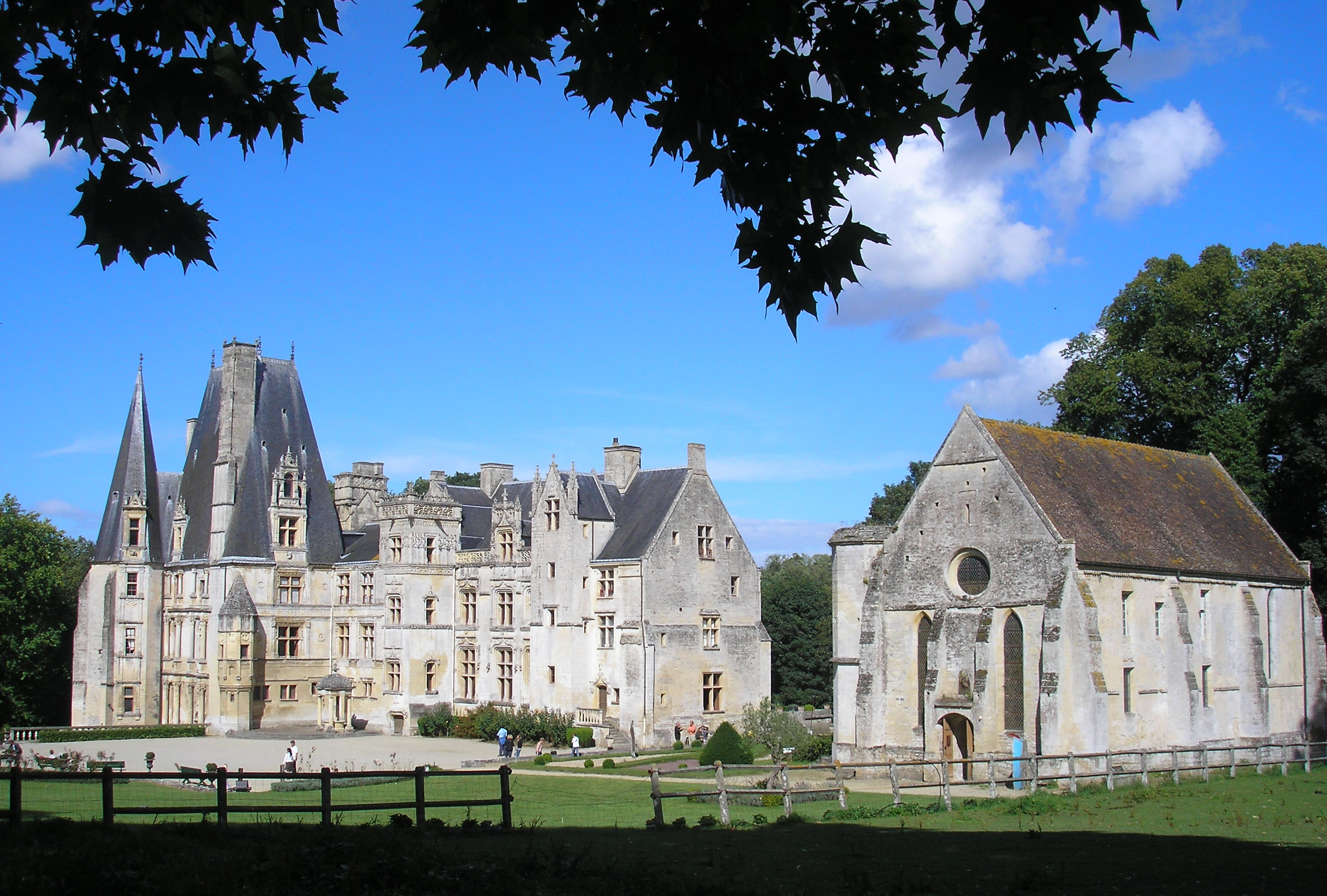 Fontaine-Henry (Normandie, France). Le château et la chapelle.